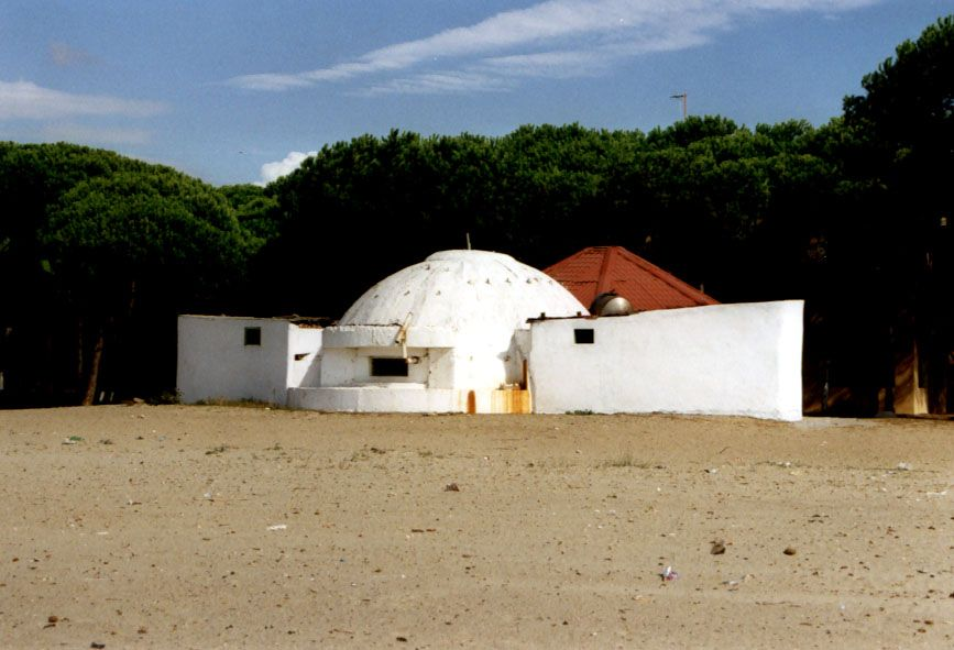 Geschützbunker an der Adria in Albanien.